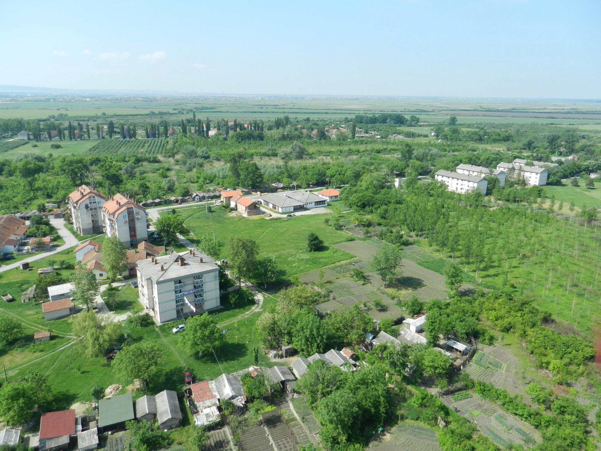 Фотографија насеља из ваздуха